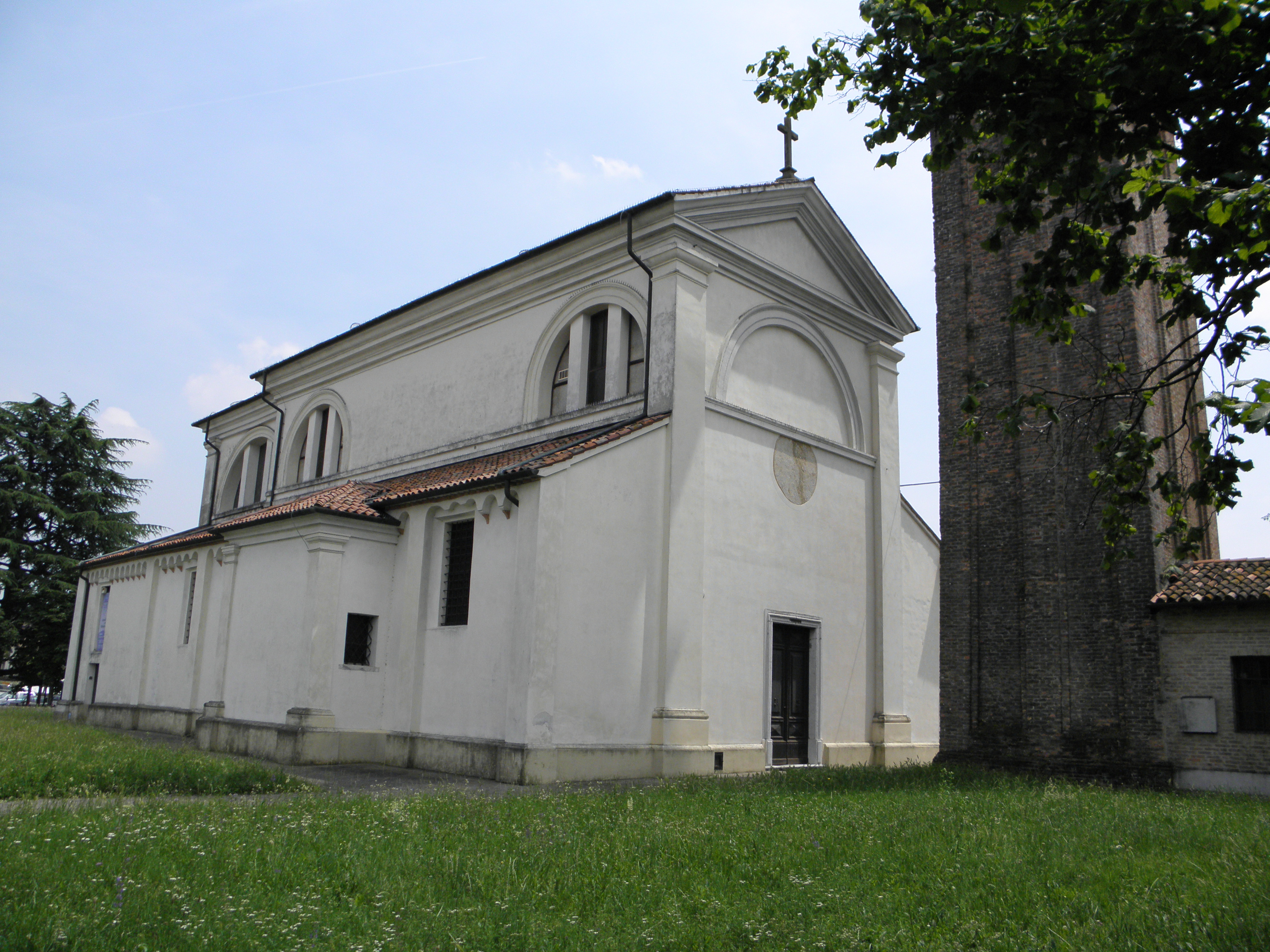 Sambughè, frazione di Preganziol: la chiesa parrocchiale di San Martino.